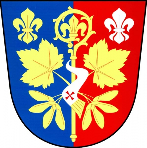 znak, Klenovice, okres Tábor